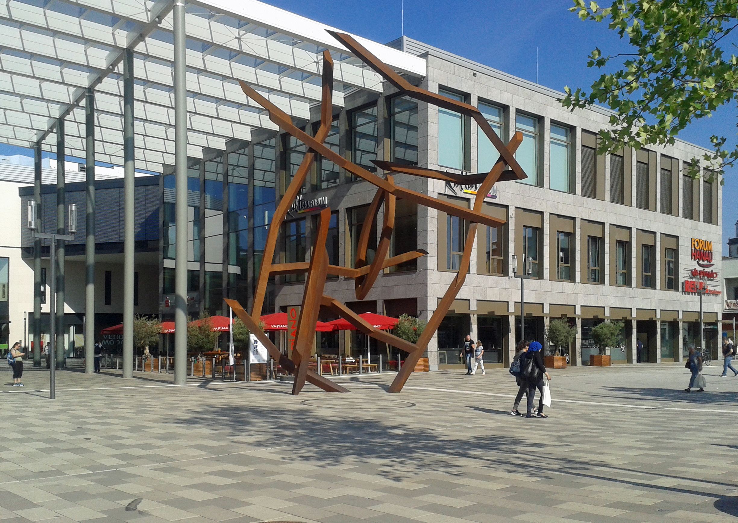 Forum Hanau